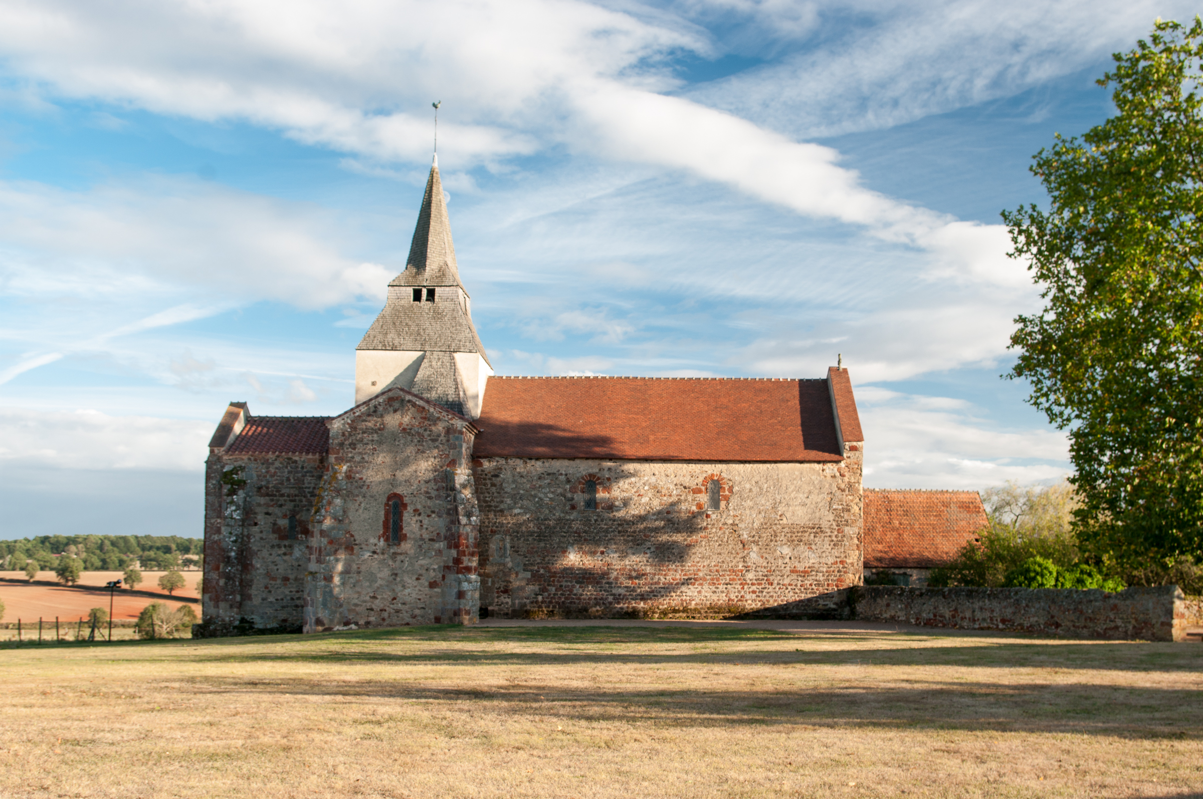 Église Saint-Denis, (Inscrit, 1952) .